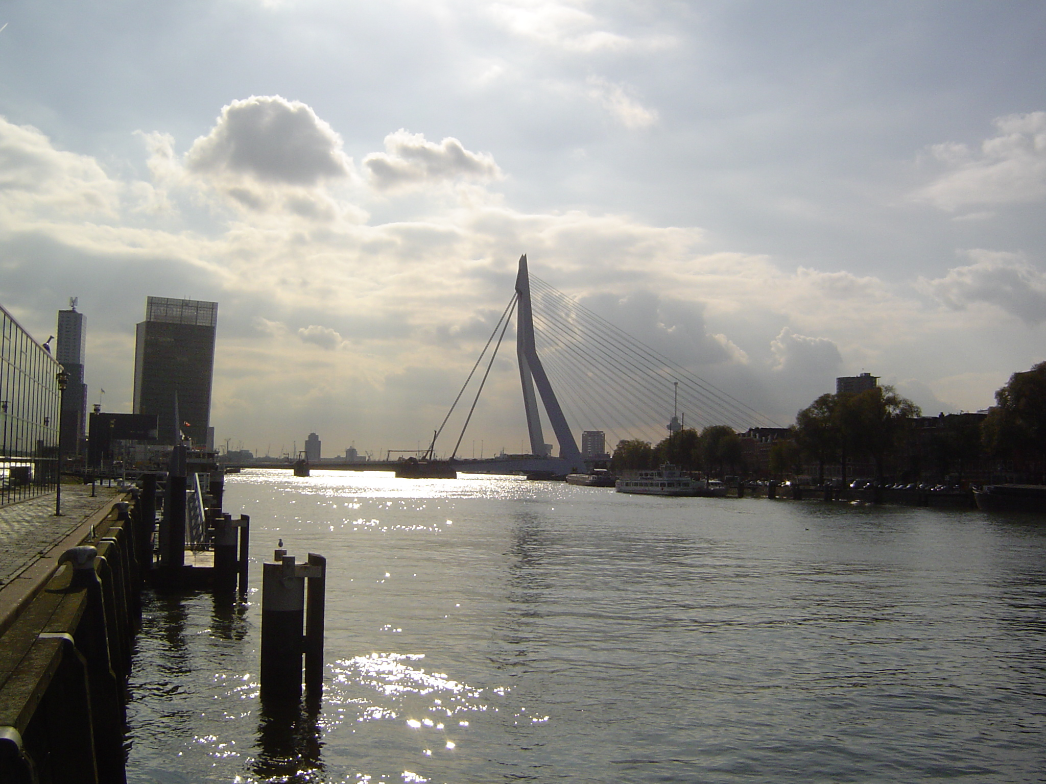 Koningshaven, Rotterdam